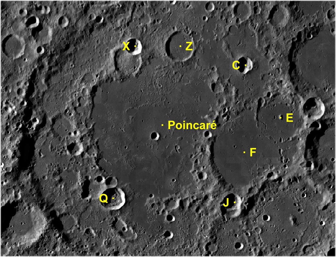 Cráter lunar Poincaré. Cráteres satélite. (Imagen LRO)